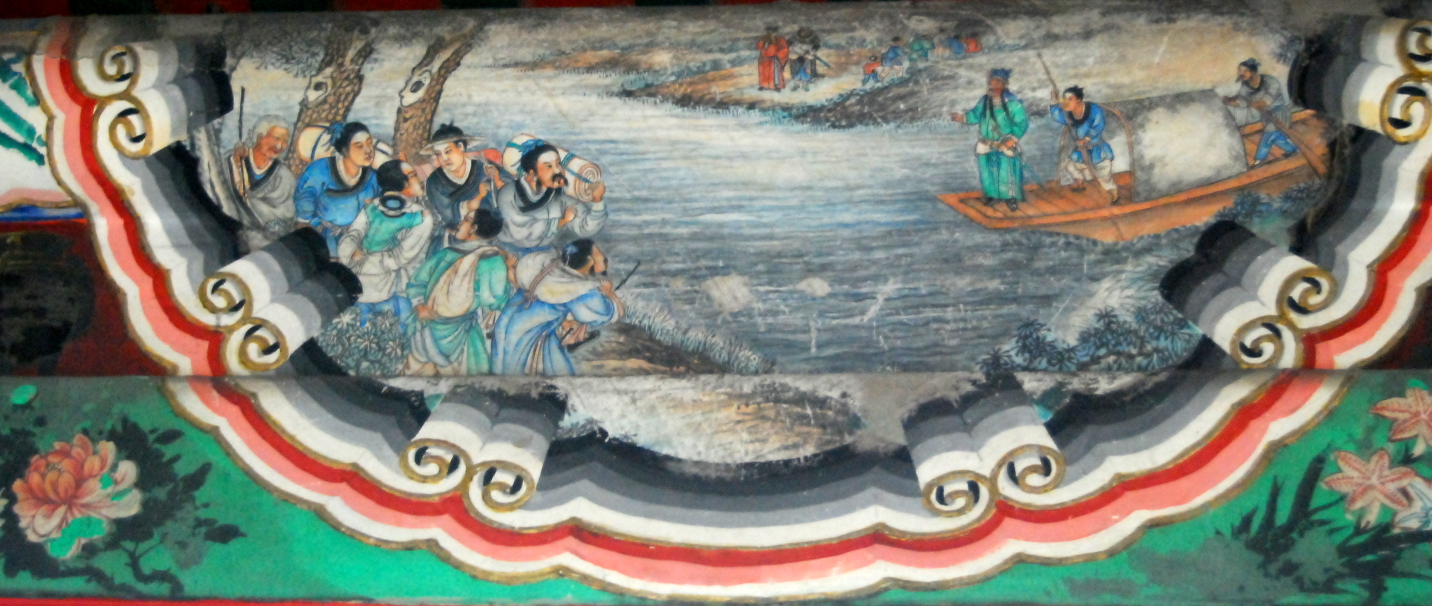 三国故事，携民渡江